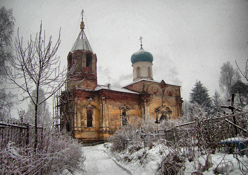 Каменная церковь строилась архитектором И.Роутом по типовому проекту К.Тона с 1852 г. по 1856 г. на месте сгоревшего деревянного храма XVIII в., освященного в честь Иова Многострадального.